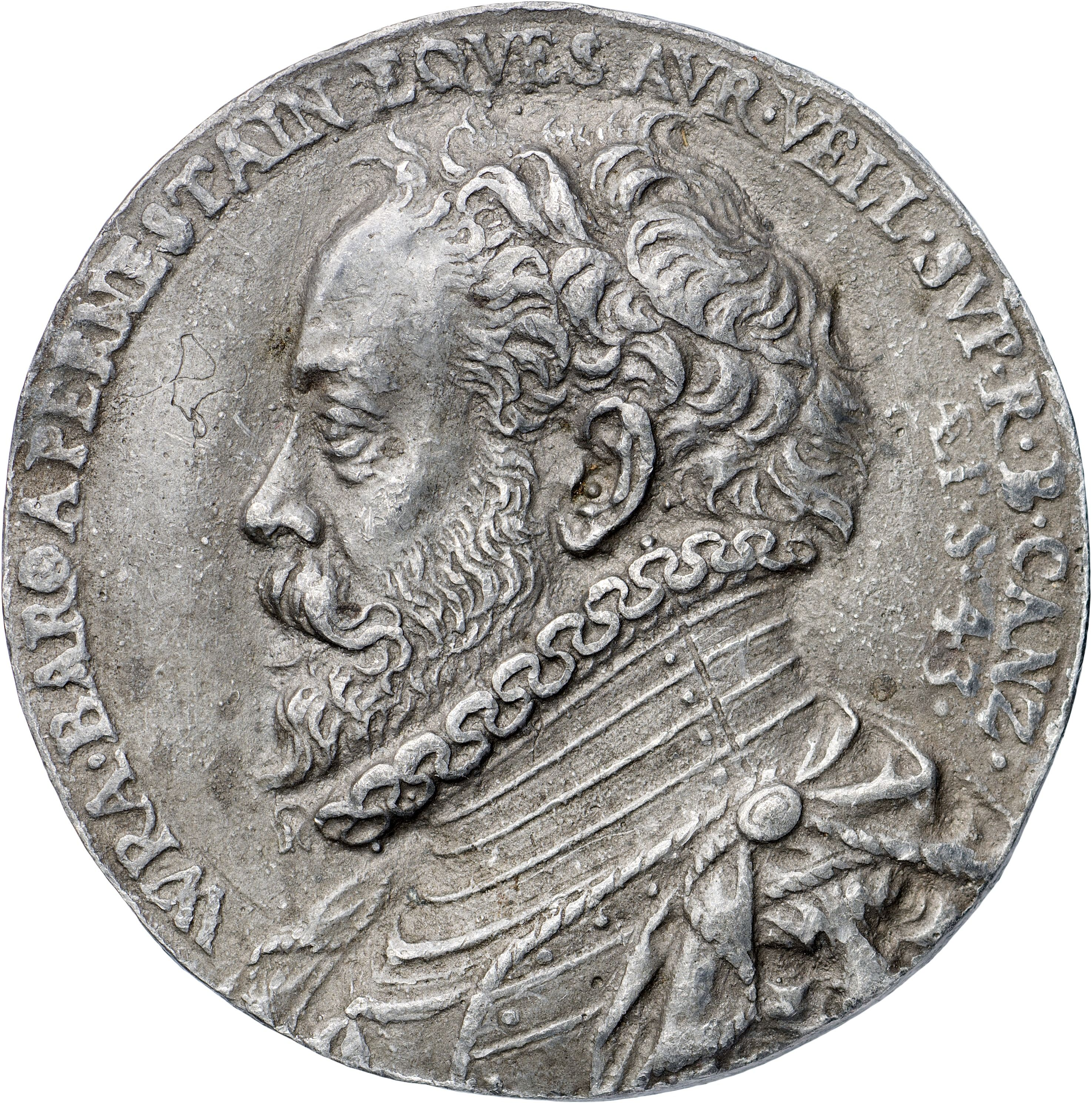 Medaile Vratislava z Pernštejna od Antonia Abondia, 1573